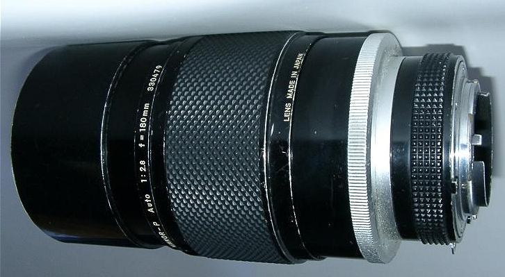 Teleobjektiv-180mm